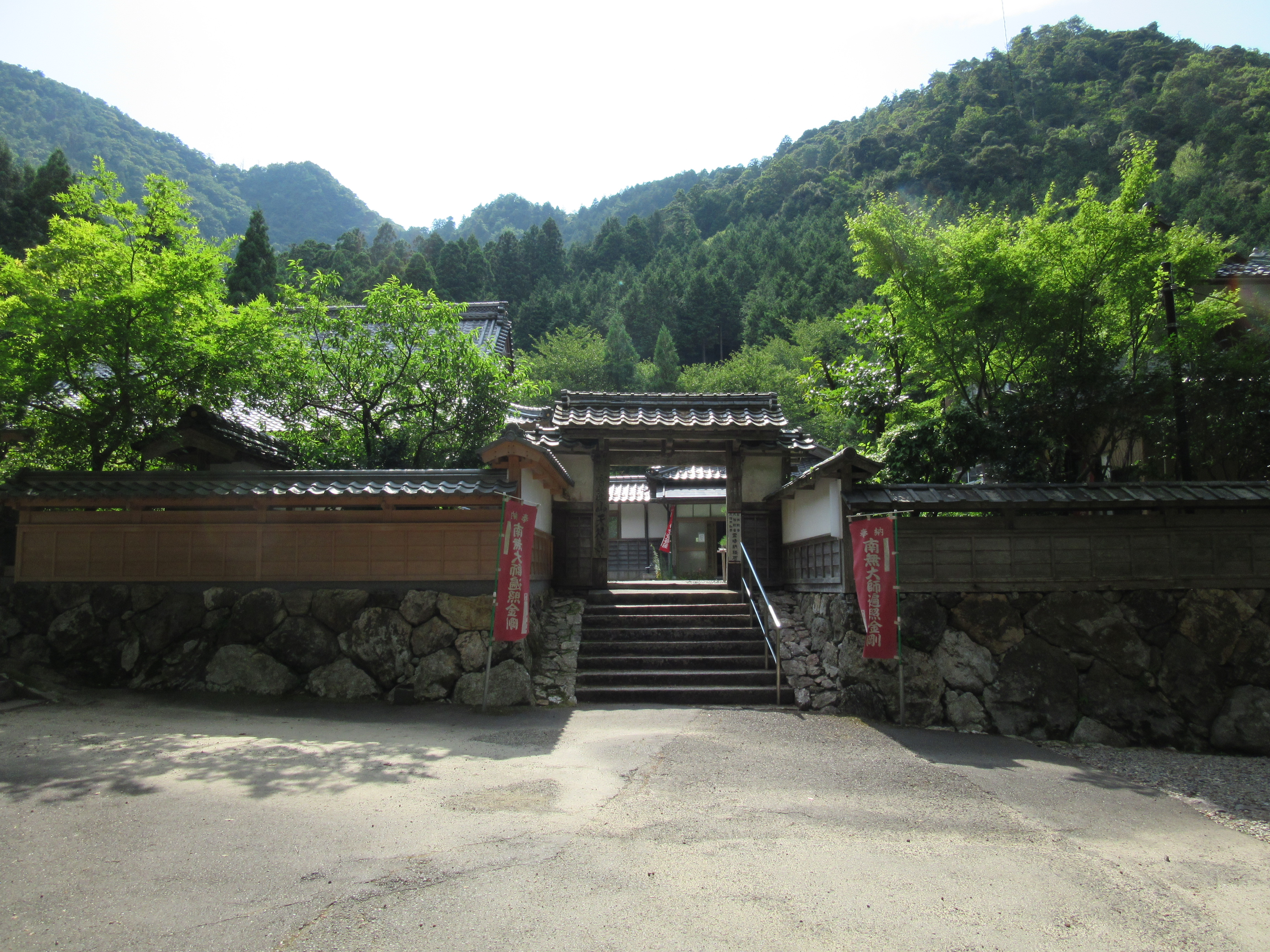 若狭町の天徳寺